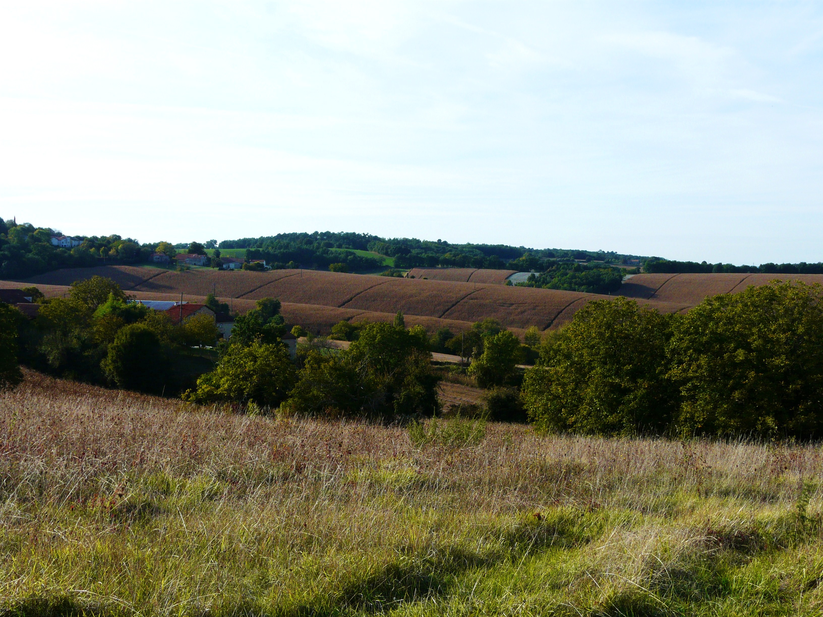 Le sud de la commune de Douchapt, Dordogne, France